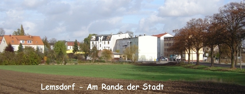 Peripherie von Magdeburg-Lemsdorf